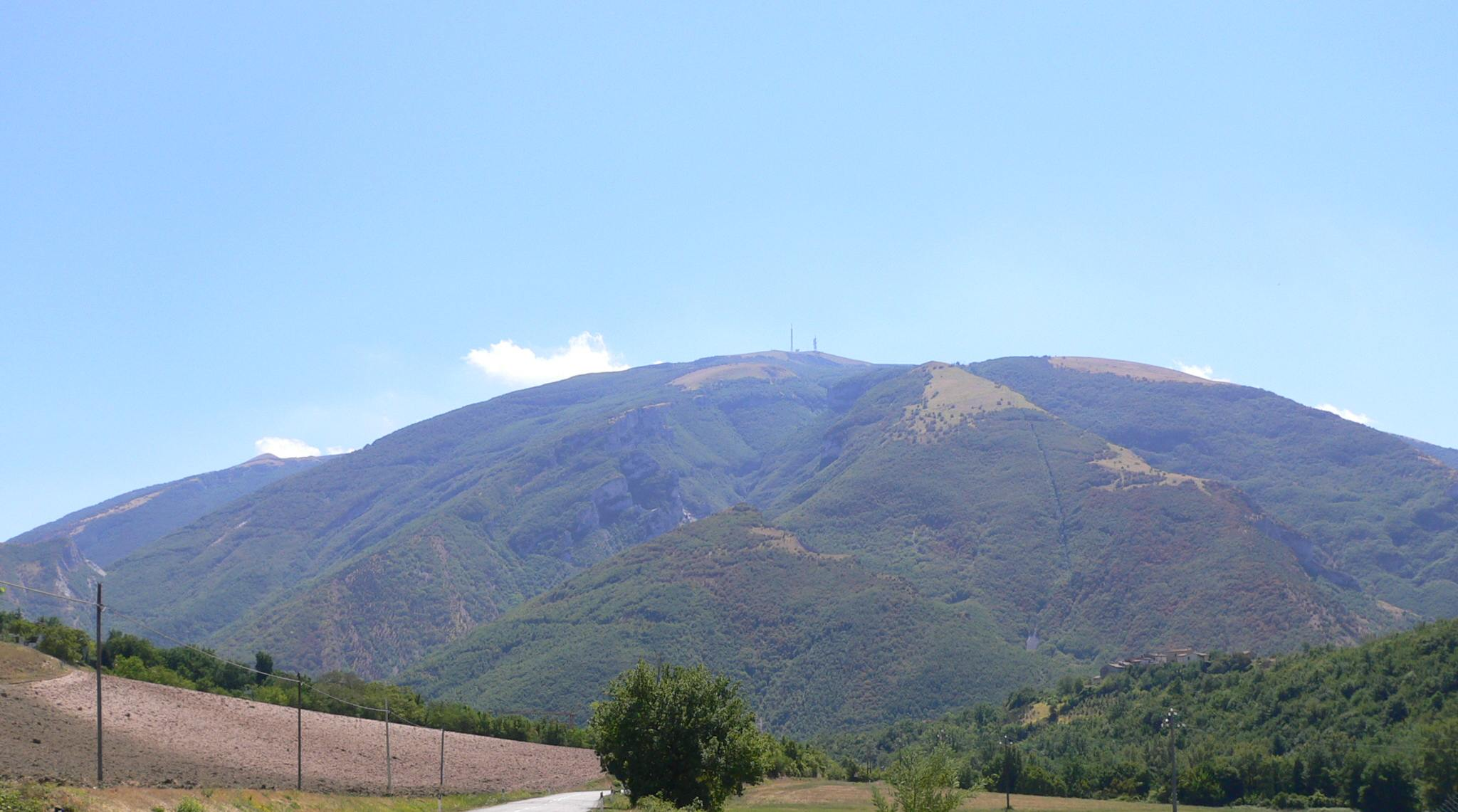 M. Nerone (visto da Piobbico)